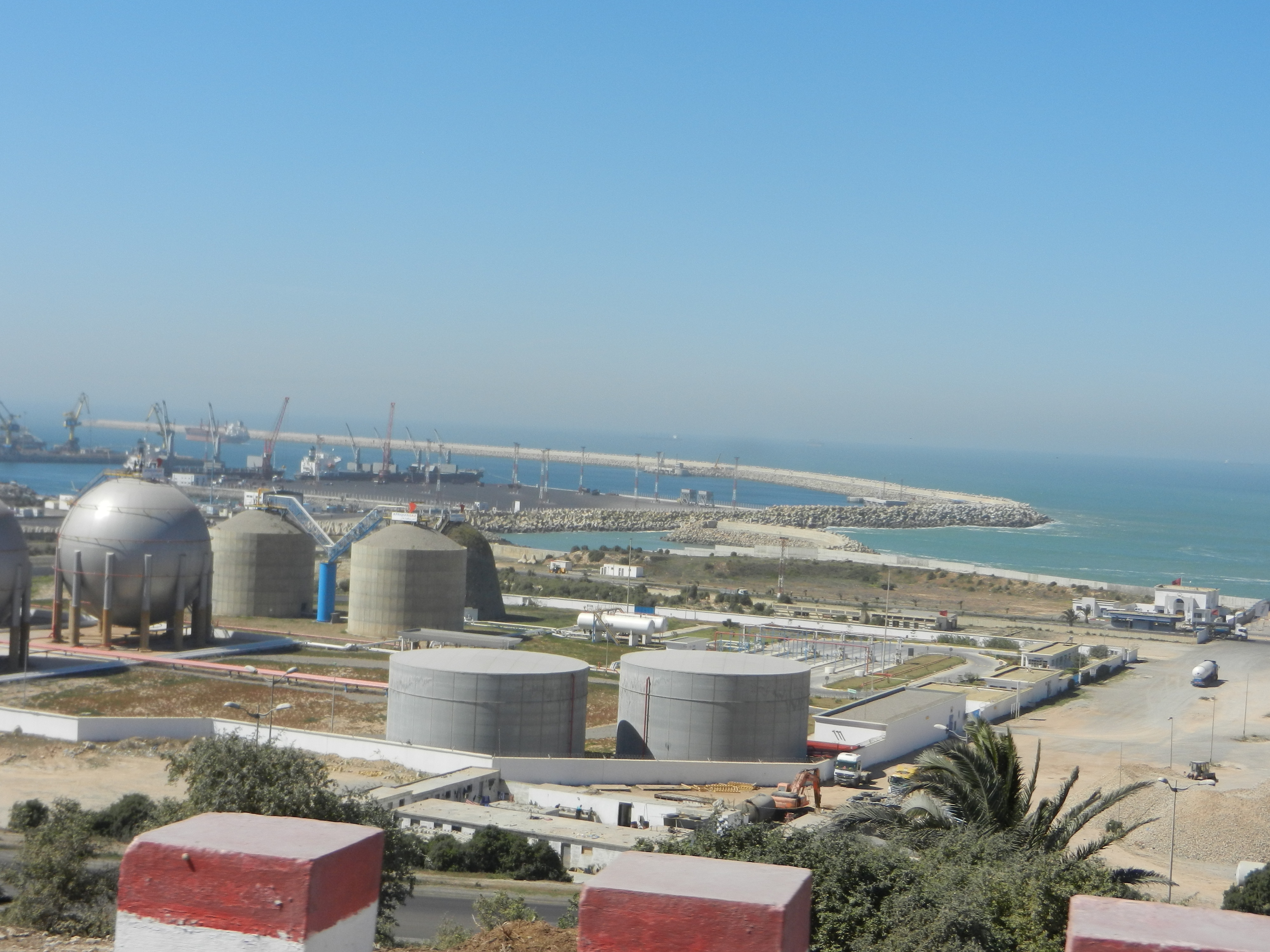 site portuaire